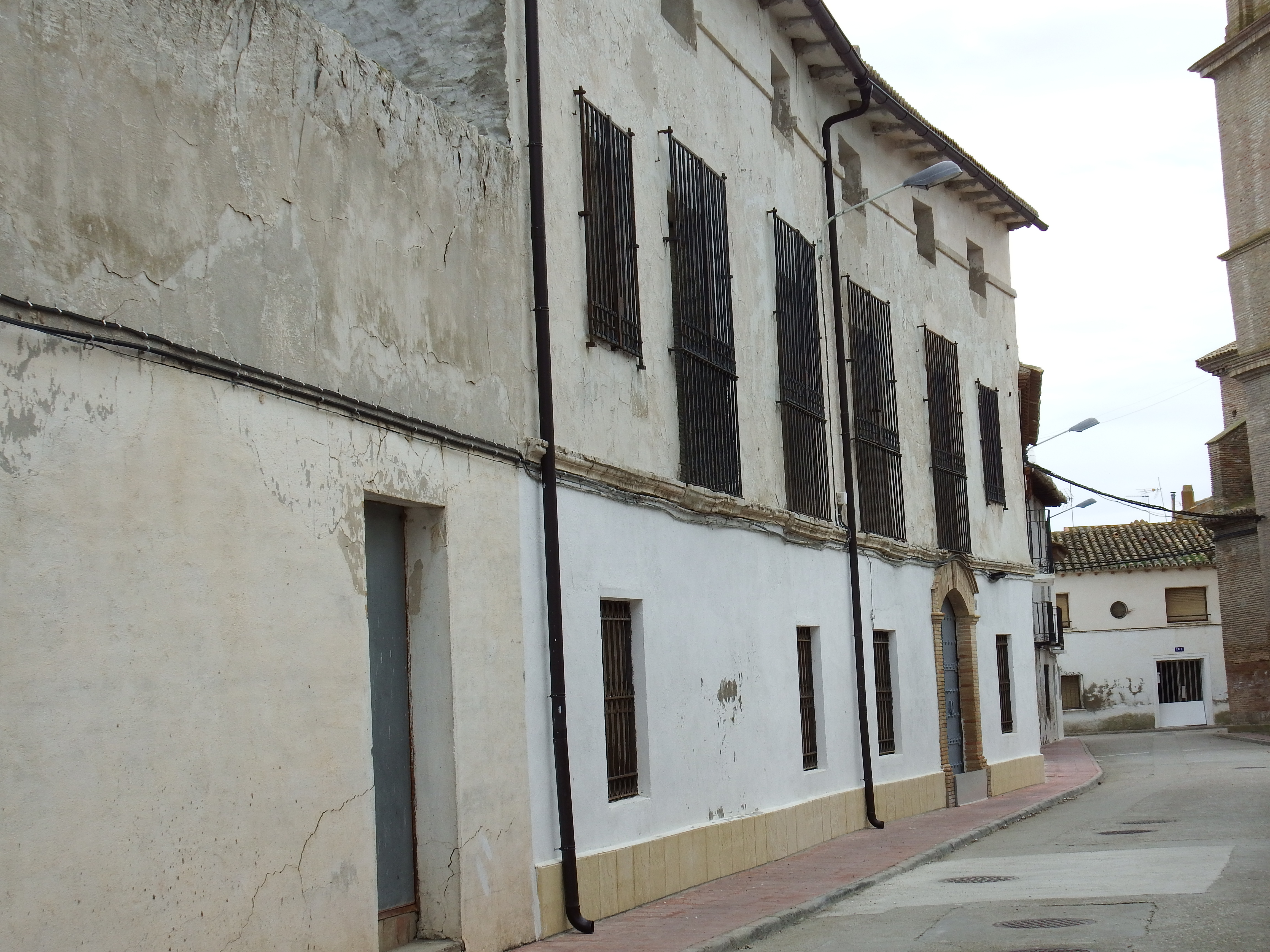 Valfarta